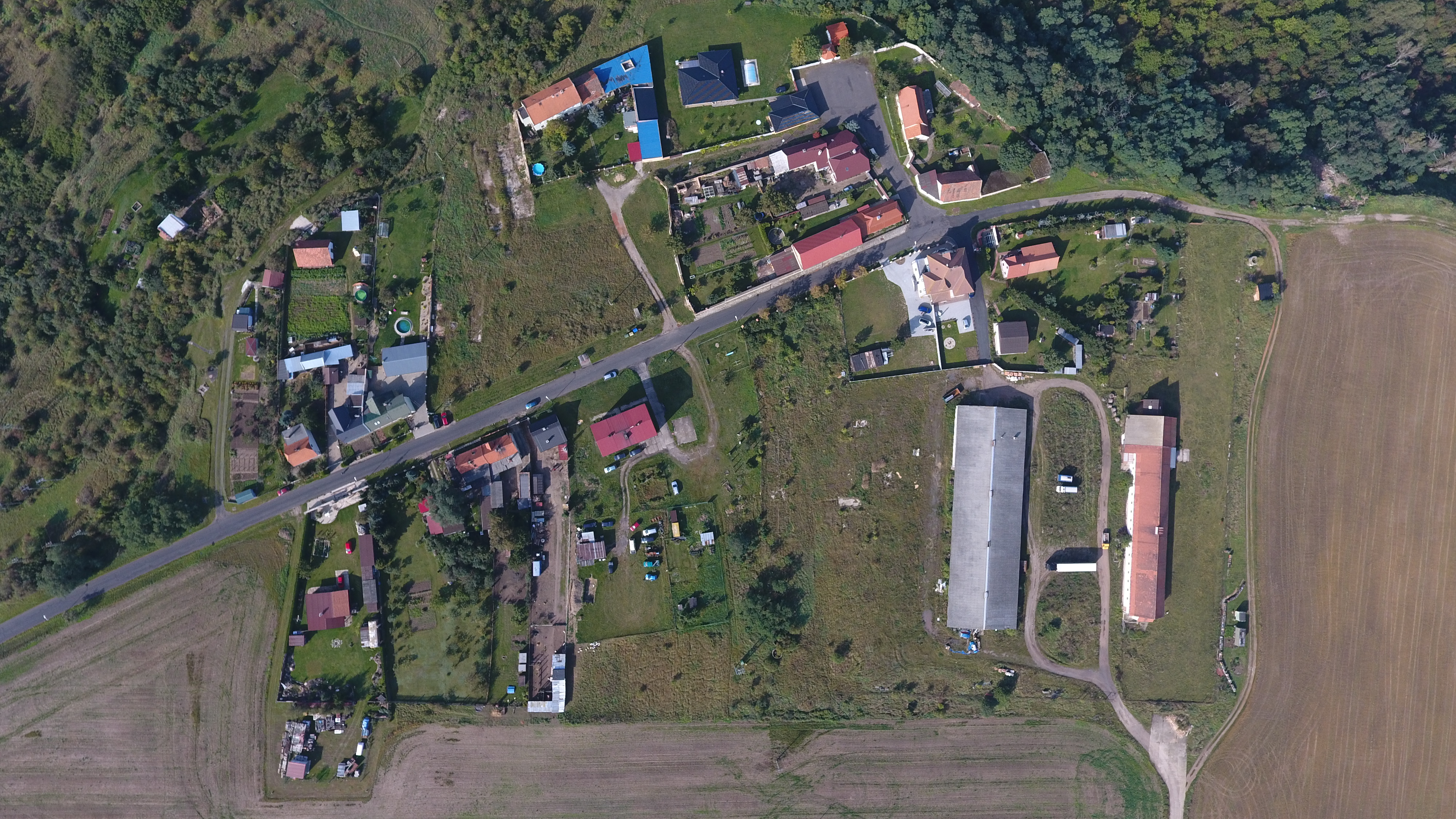 Záhoří z leteckého pohledu.